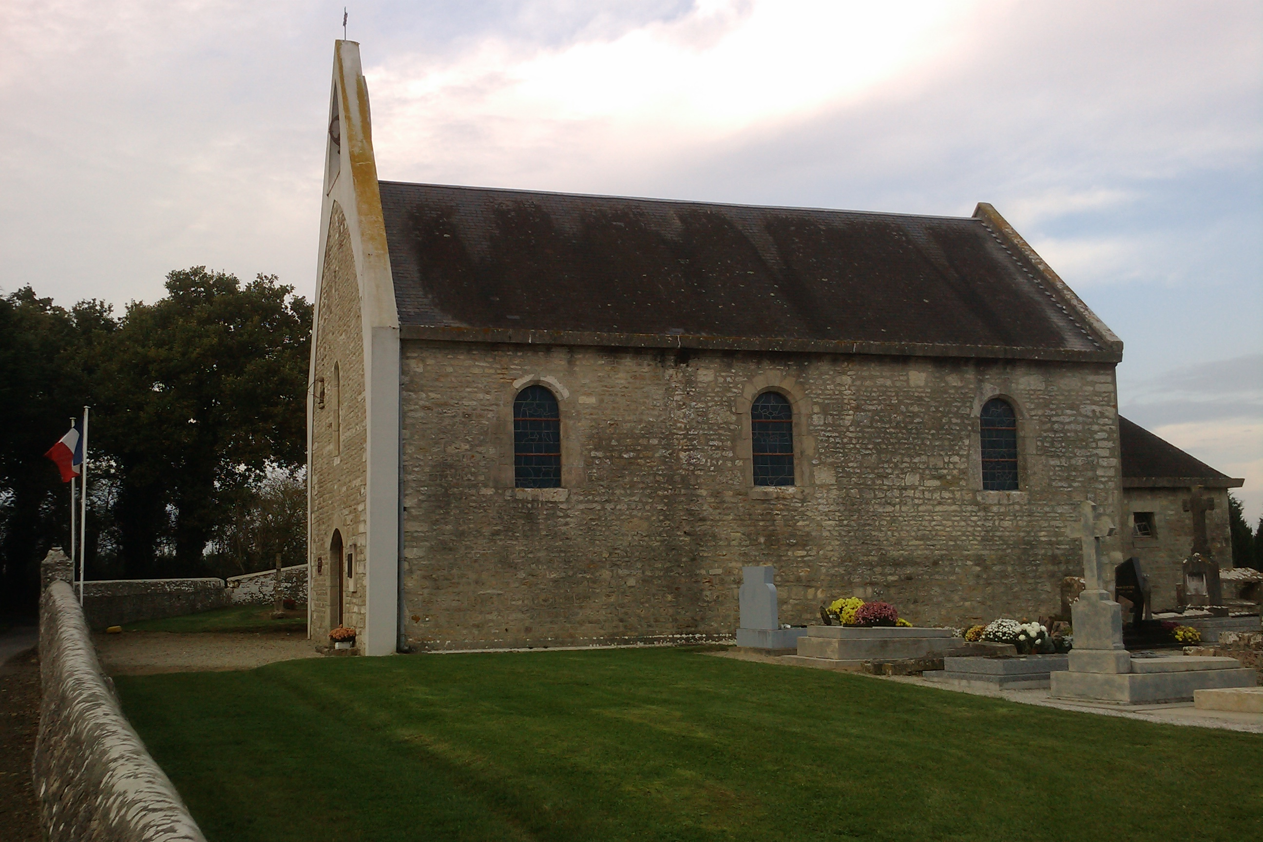 Chapelle de Cauquigny, Amfreville (Manche)